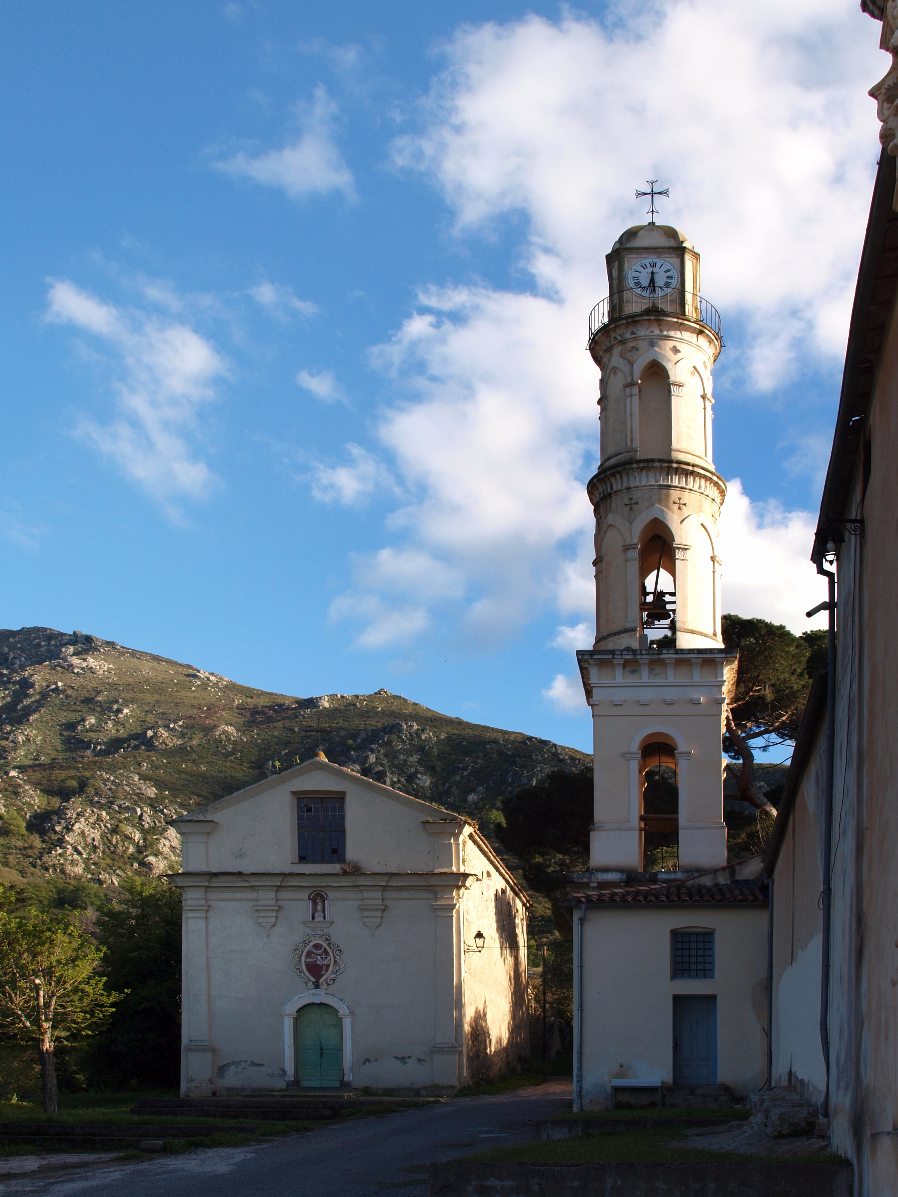 Ville-di-Paraso, Balagne (Haute-Corse) - Clocher de l'église Saint-Simon et la Casazza (chapelle de confrérie)